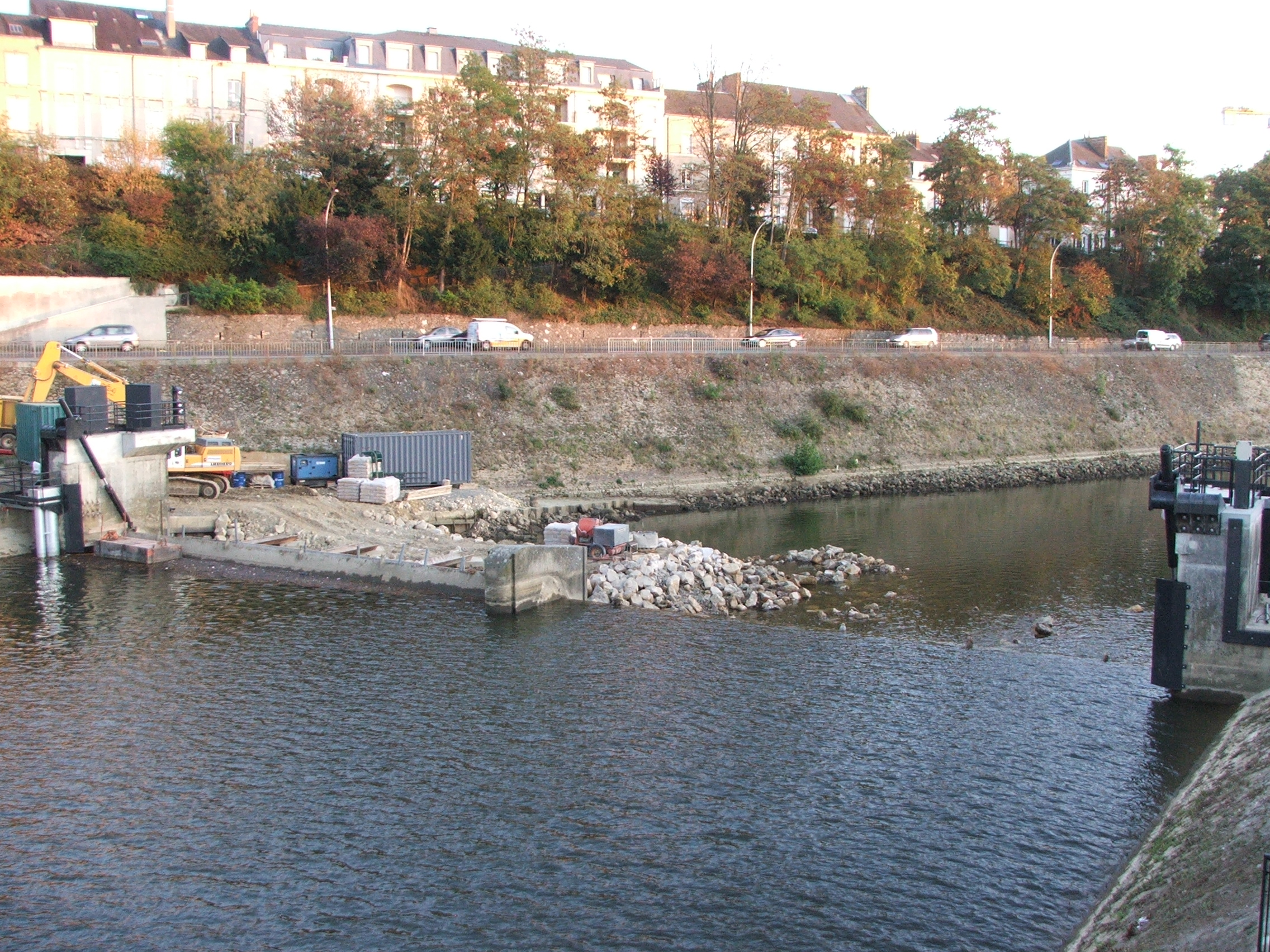 Travaux sur le barrage du Greffier en marge de la Sarthe au Mans en octobre 2009.